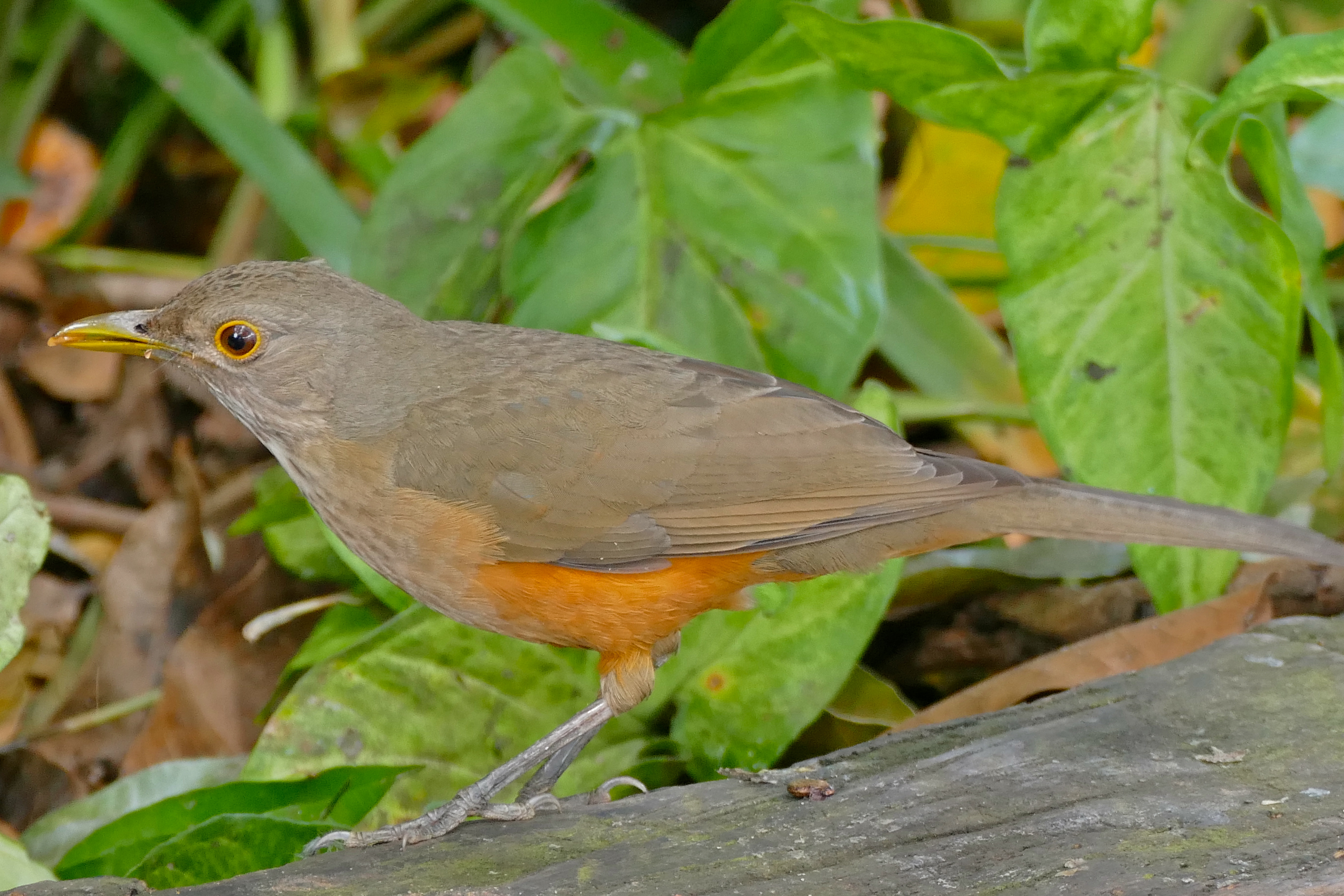 Hotel Pantanal Norte, Pixaim, Transpantaneira, Poconé, Mato Grosso, BRAZIL